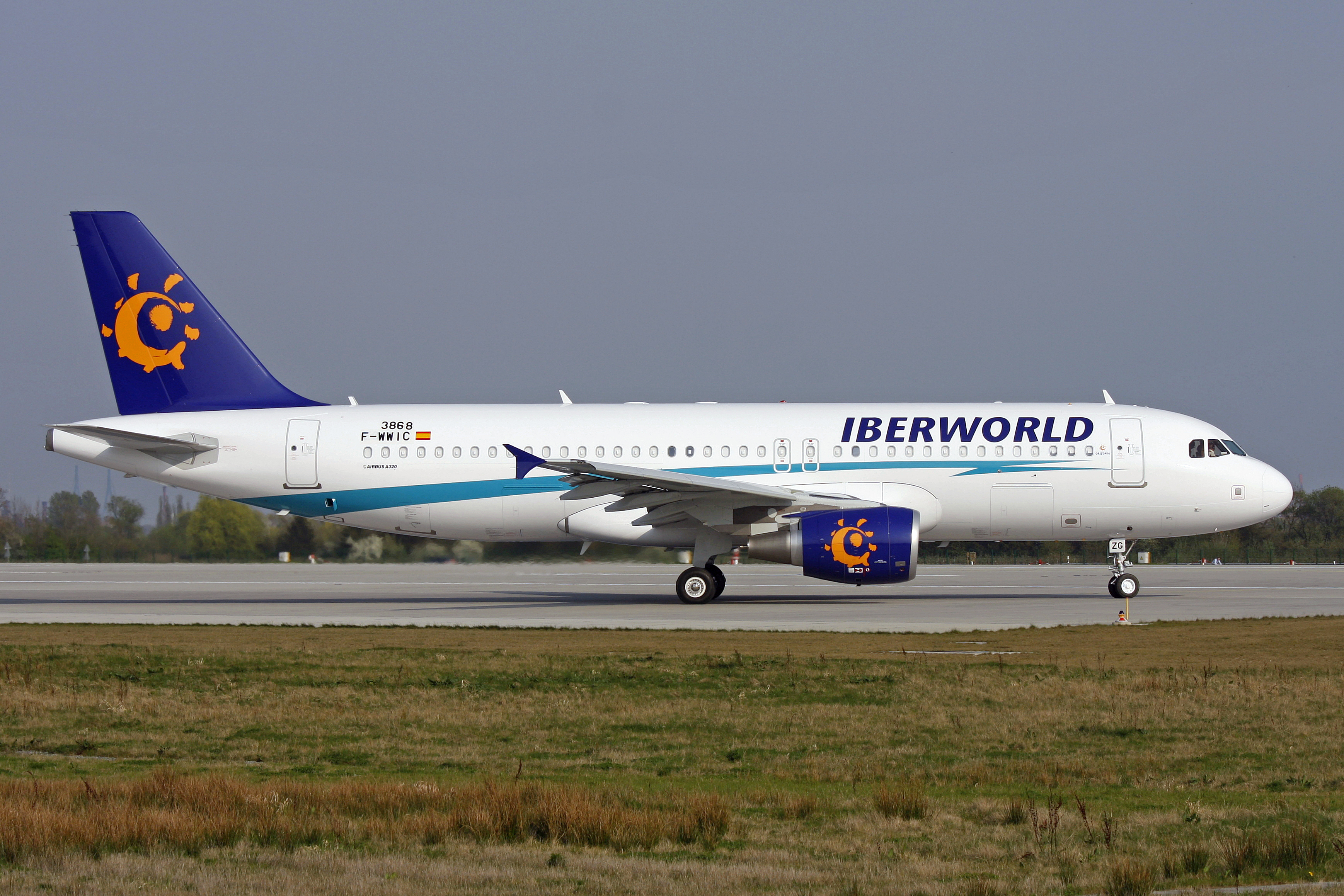 14-04-09 Aibusplant Finkenwerder